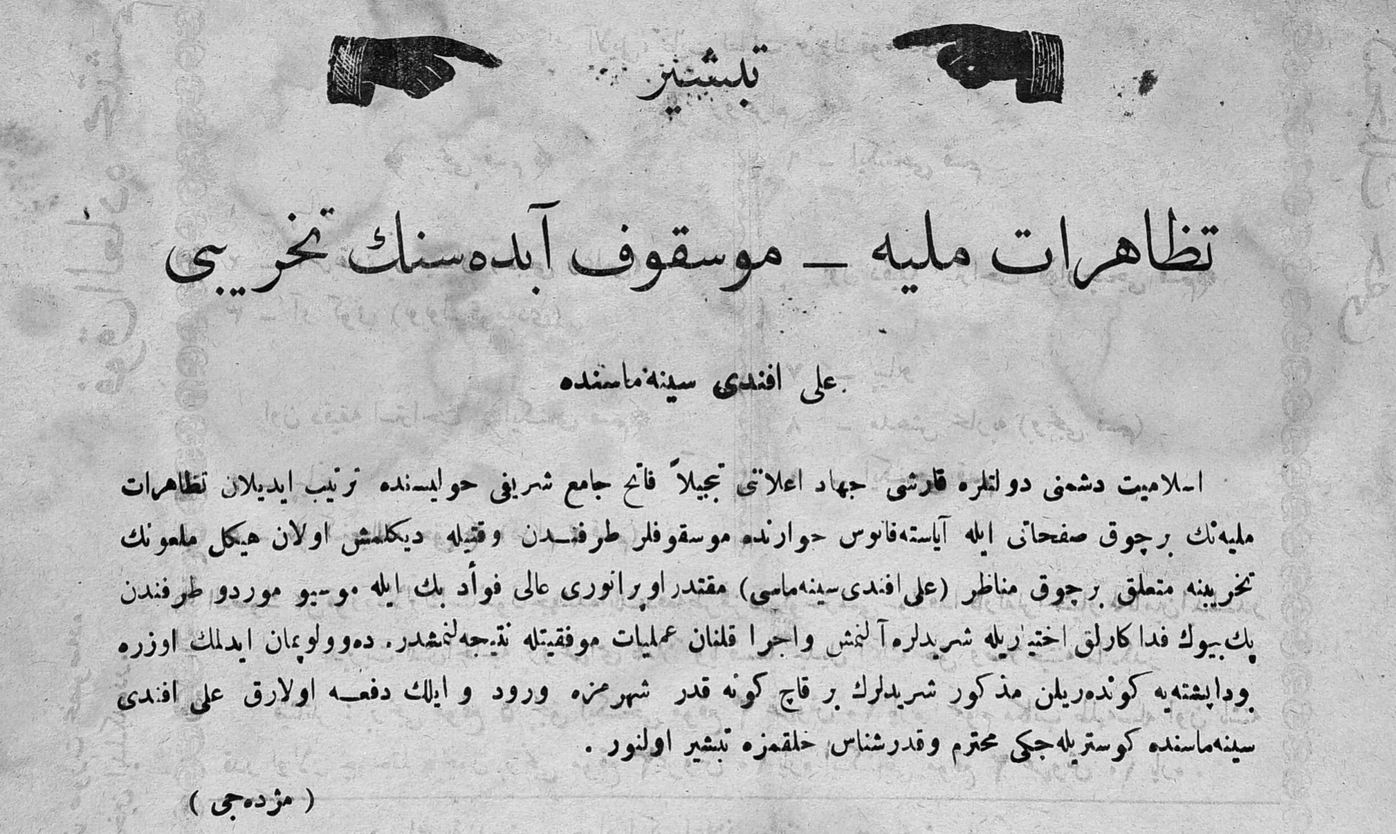 30 Kasım 1914 tarihli Sinema Haberleri gazetesindeki "Tezâhürât-ı Milliye – Moskof Âbidesinin Tahribi Ali Efendi Sinemasında" başlıklı duyuru metni.